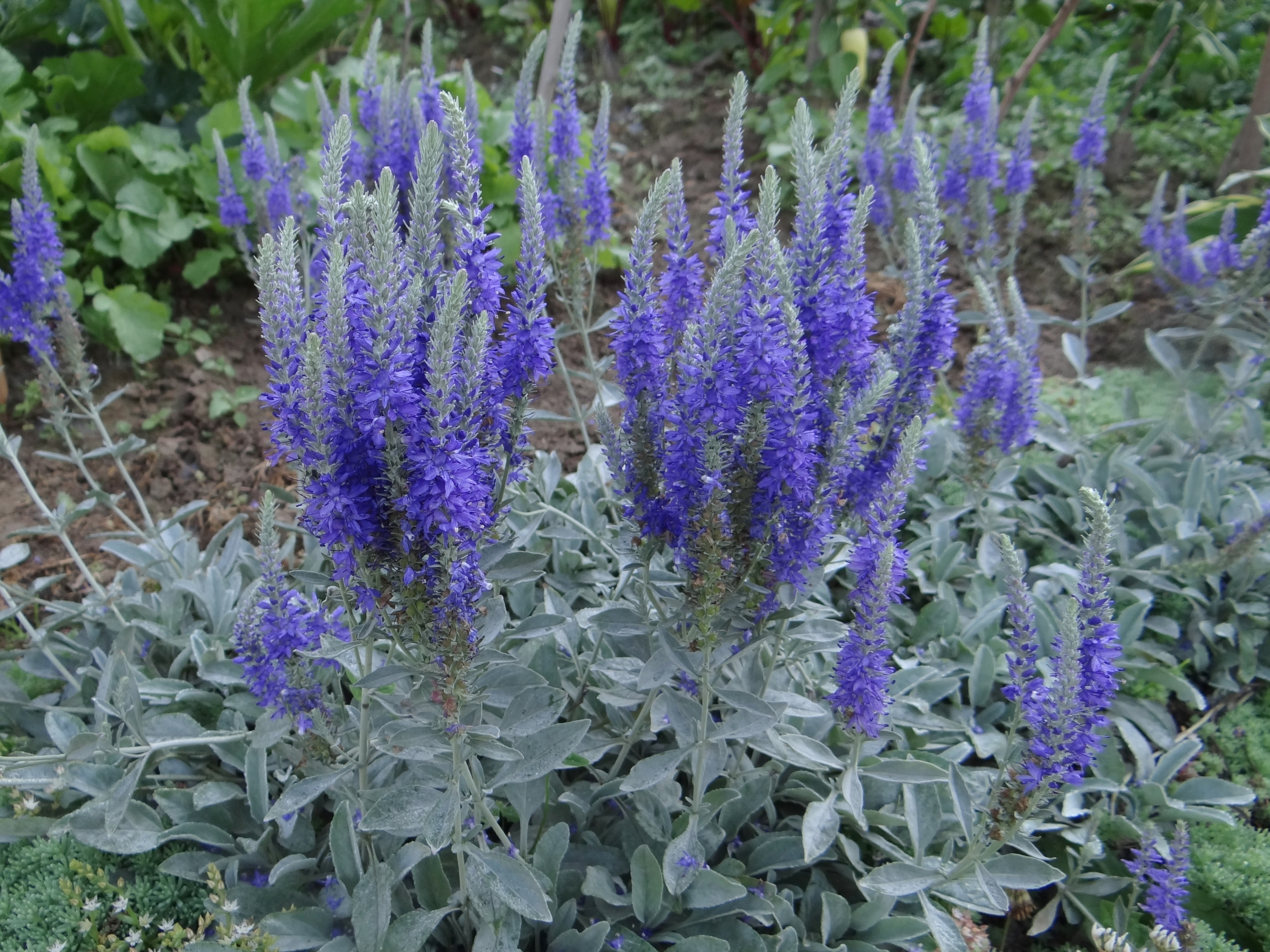 Veronica spicata subsp incana (location:Poland)